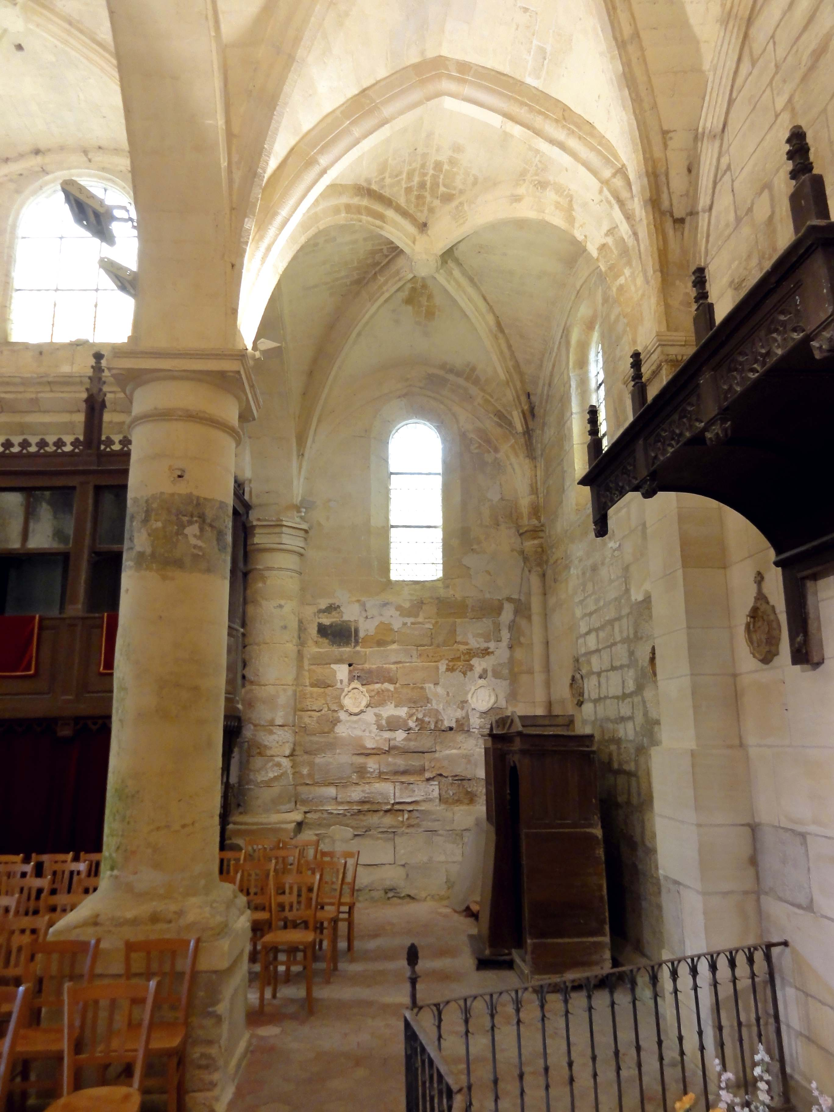 Intérieur de l'église (voir titre).